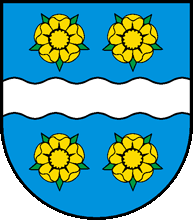 Wappen von Les-Montets Kanton Freiburg Schweiz